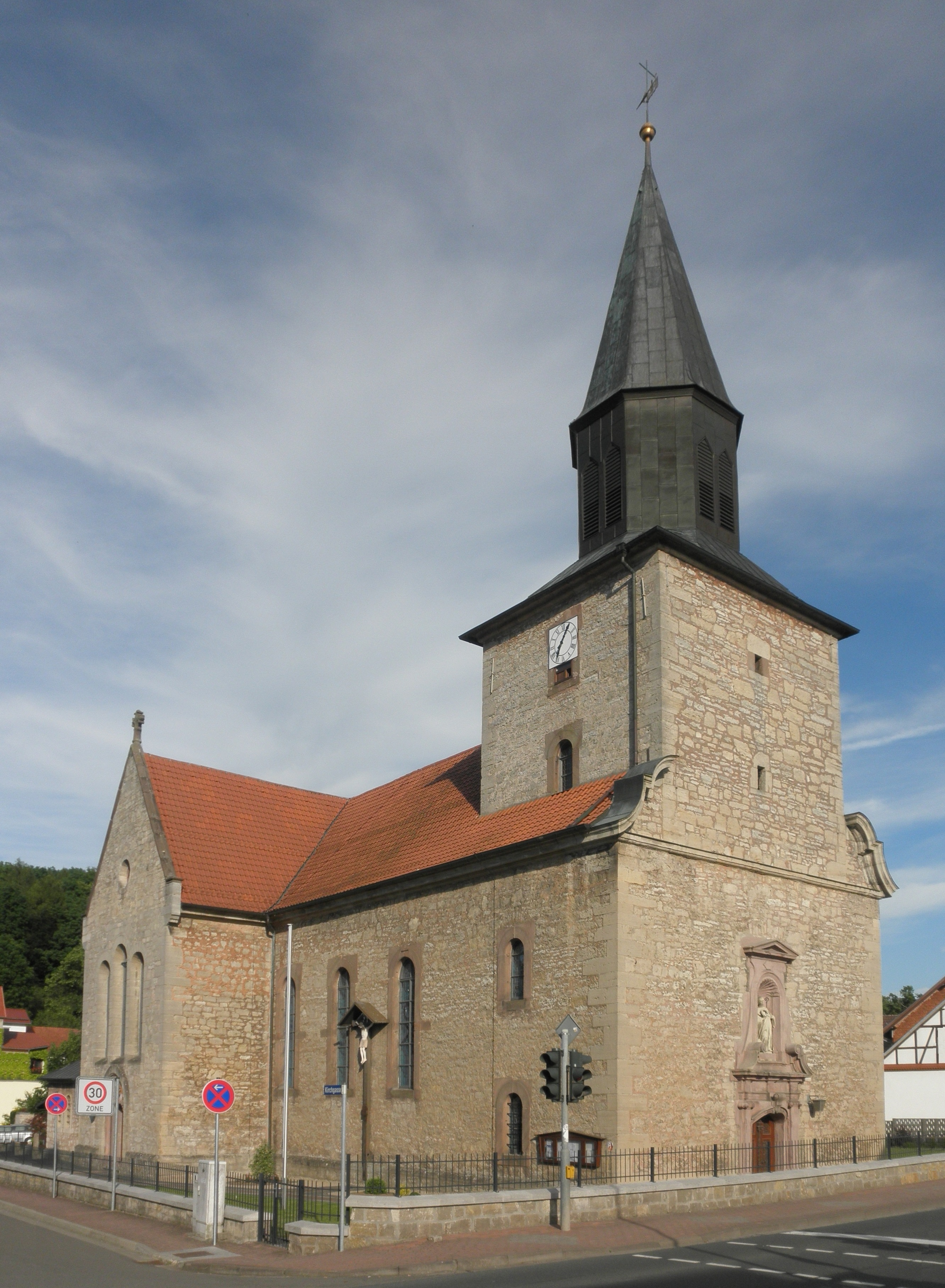 Kath. Kirche St. Martin in Kallmerode (Eichsfeld)